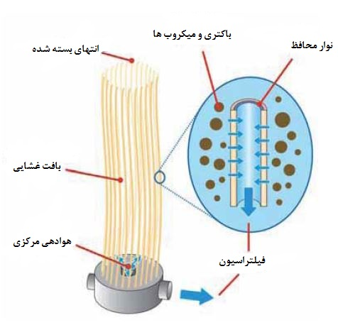 این تصویر نحوه ی فیلتر کردن را نمایش میدهد